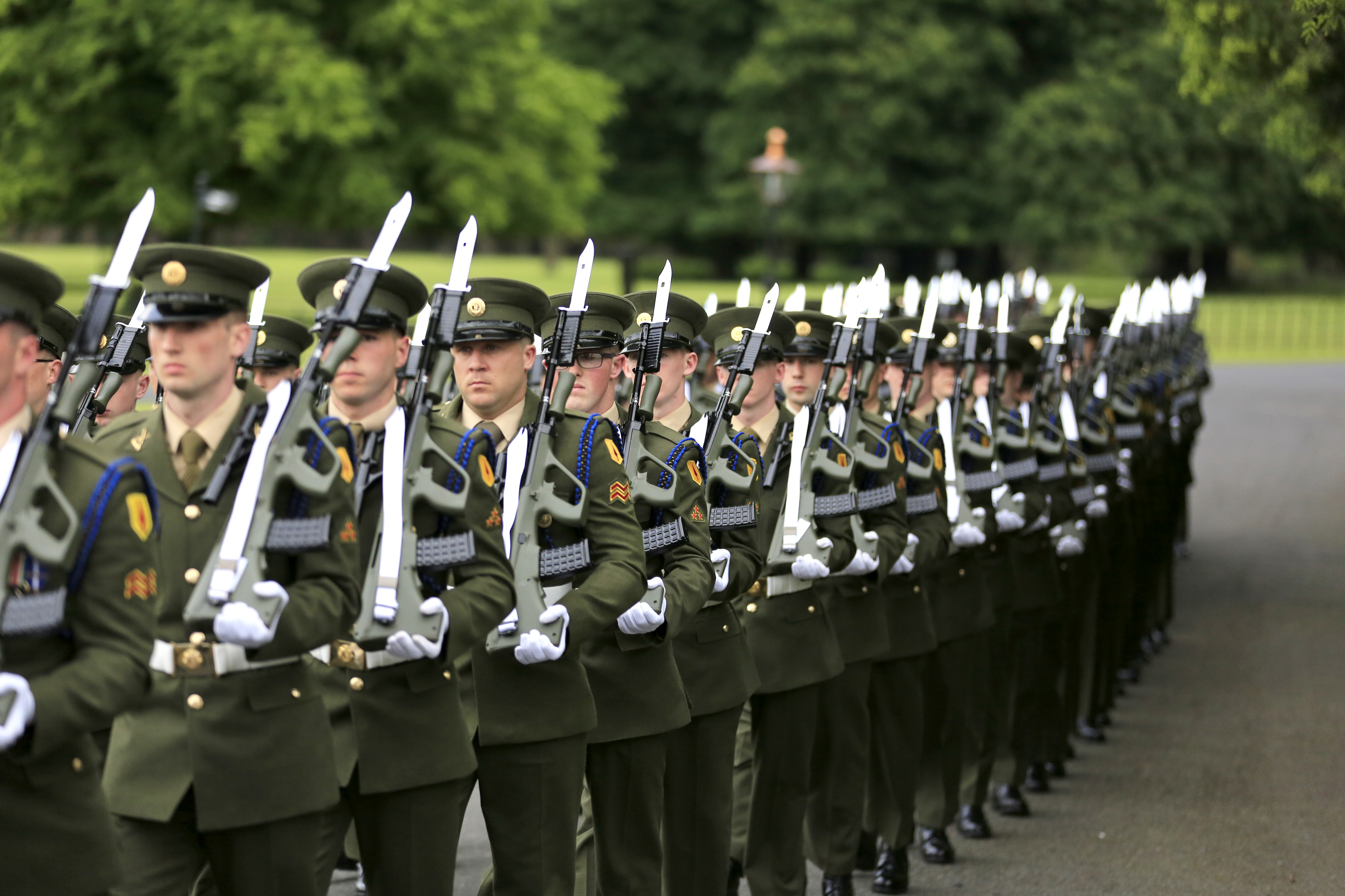 7 Inf Bn at Áras an Úachtarán